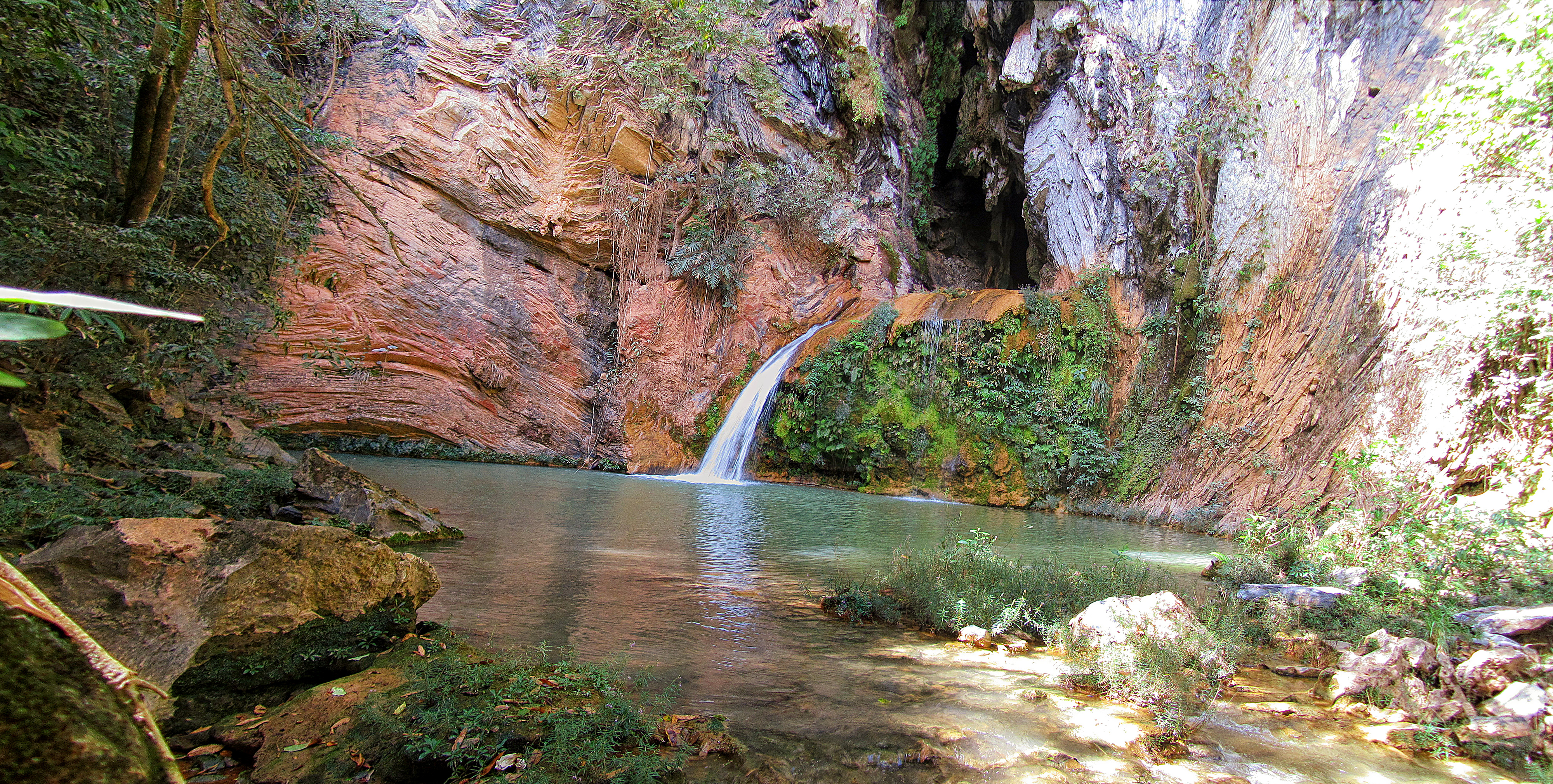 Com uma queda de aproximadamente 8m, só salta dela os que tiveram coragem de atravessar cerca de 2km por baixo da terra, no escuro absoluto. A Gruta da Jabuticabeira que fica localizada próximo ao Distrito do Bezerra, Formosa - GO - Brasil